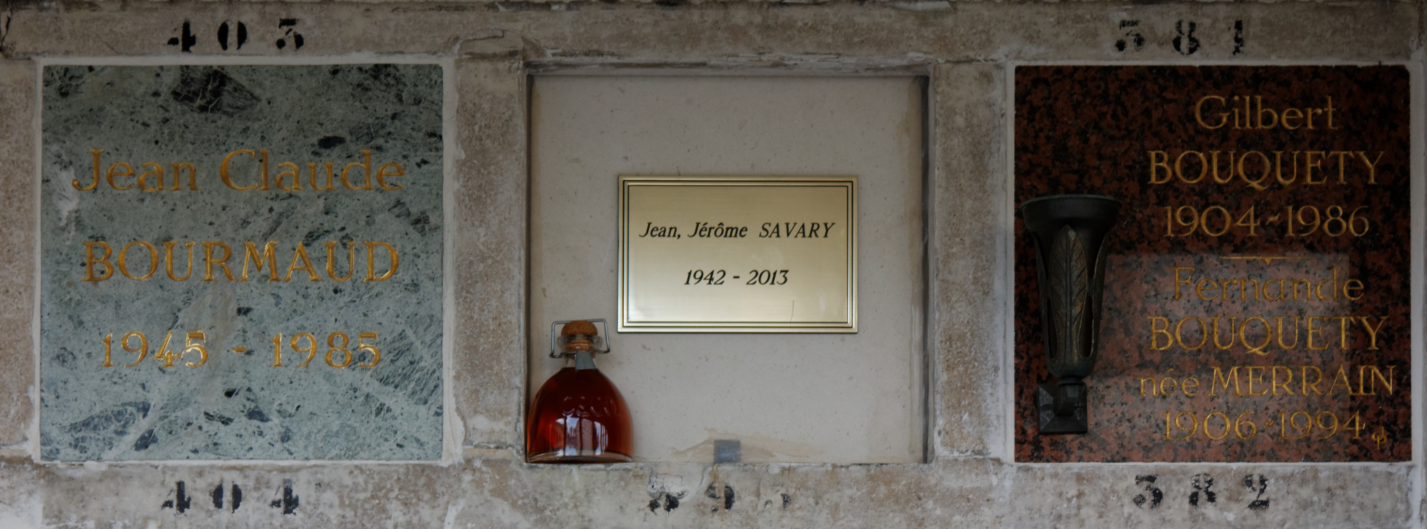 Vue d'ensemble